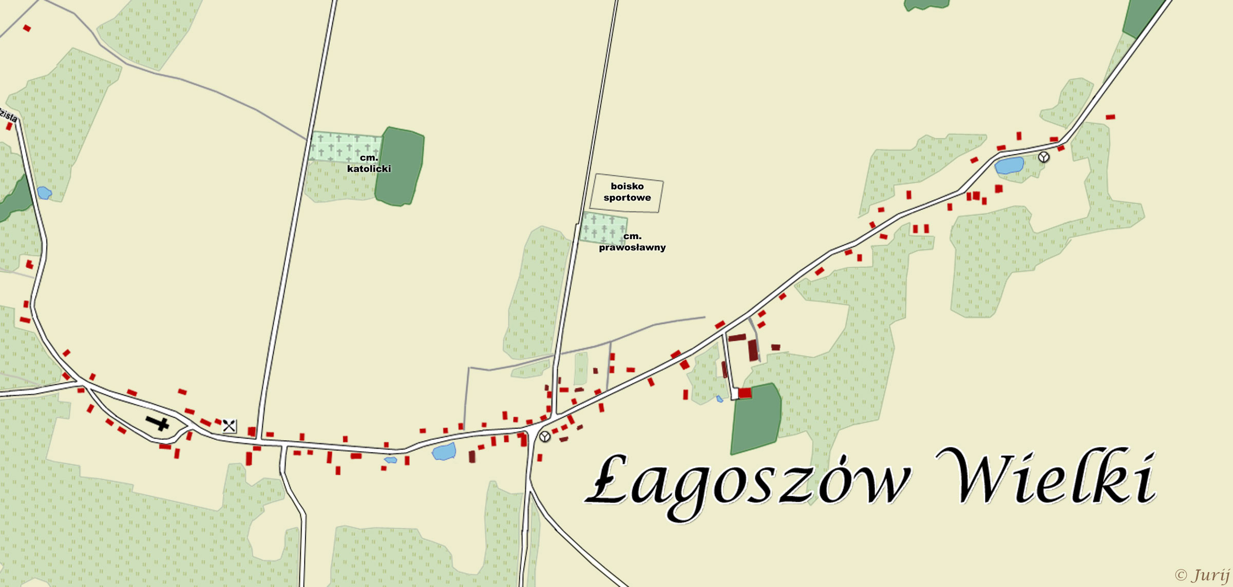 Łagoszów Wielki, powiat polkowicki, woj. dolnośląskie, Poland 2006 by Jurij